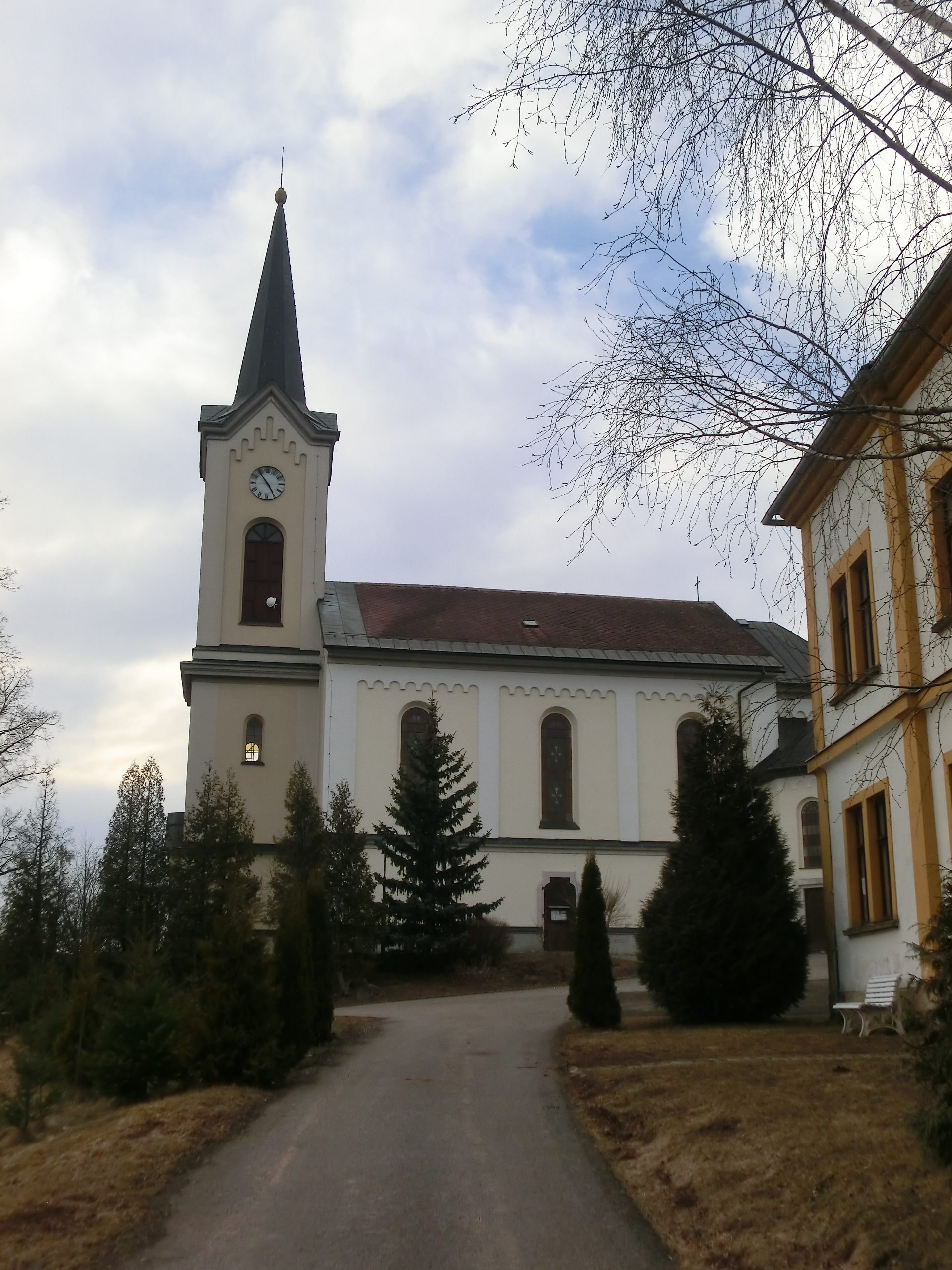 Novorománský kostel sv. Jana Křtitele stojí od roku 1868 u okraje obce Studenec na terénním ostrohu ve výšce cca 530 m n.m.